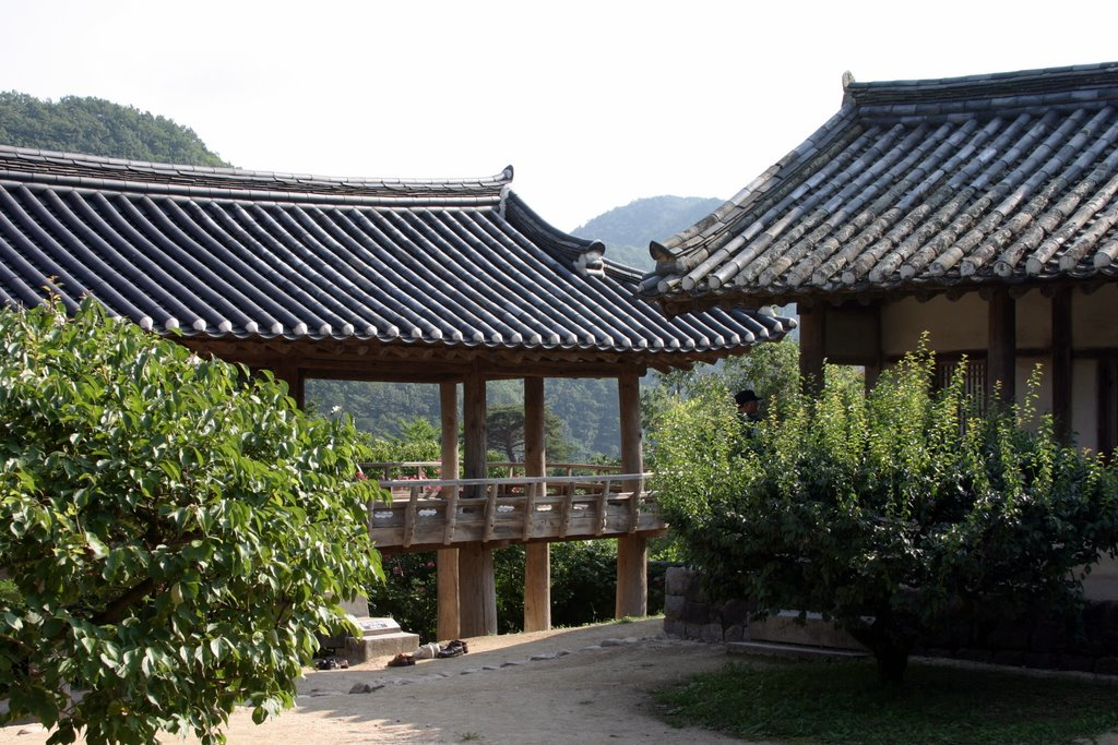 Byeongsan Seowon in Byeongsan-ri, Andong, Gyeongsangbuk-do, South Korea.